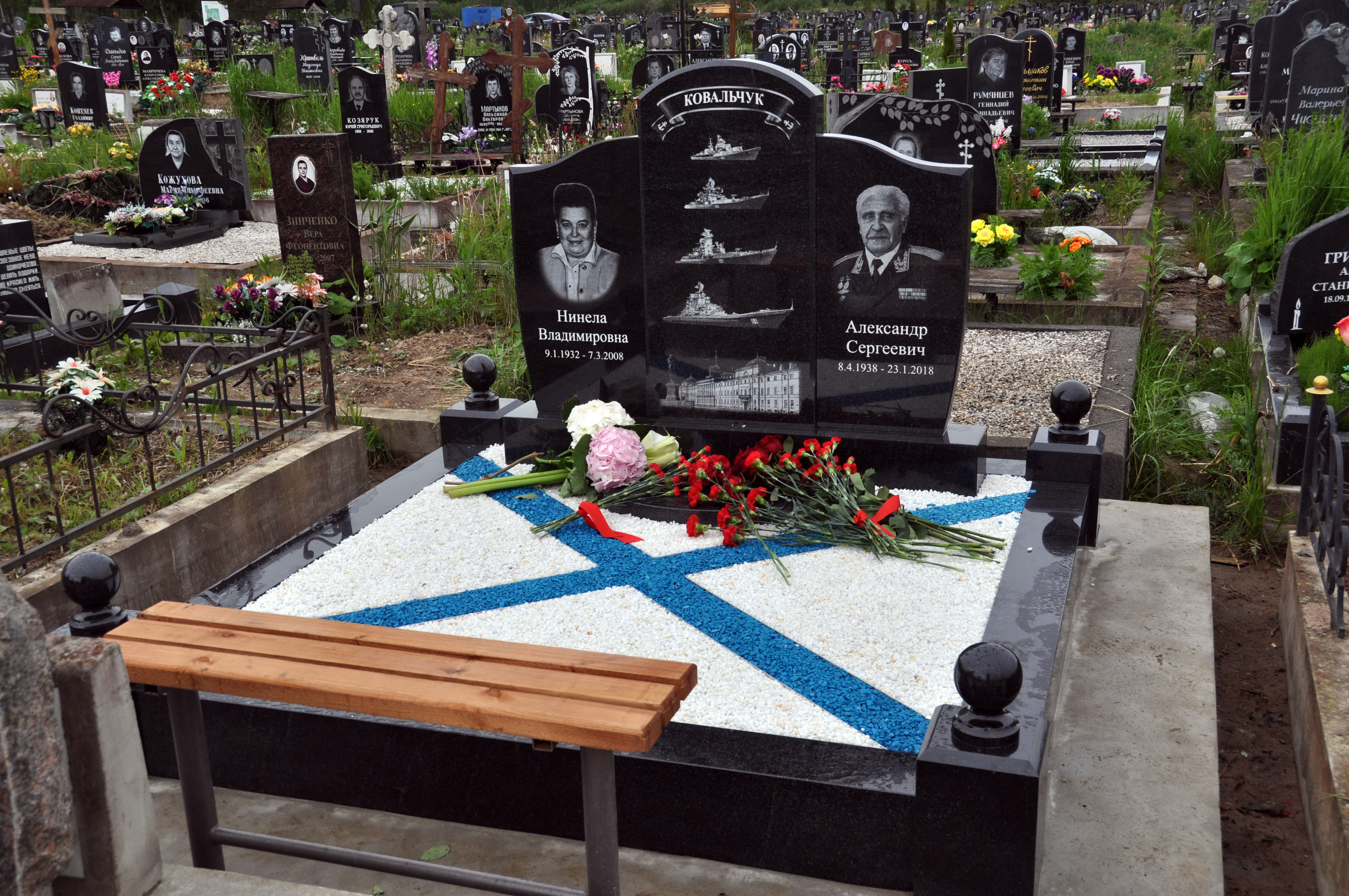 Памятник, установленный семьей на месте захоронения А.С.Ковальчука. Санкт-Петербург, Южное кладбище, Яблоневая аллея 26, ряд 31, место 17А. Координаты: N59.77658°, E30.26667°